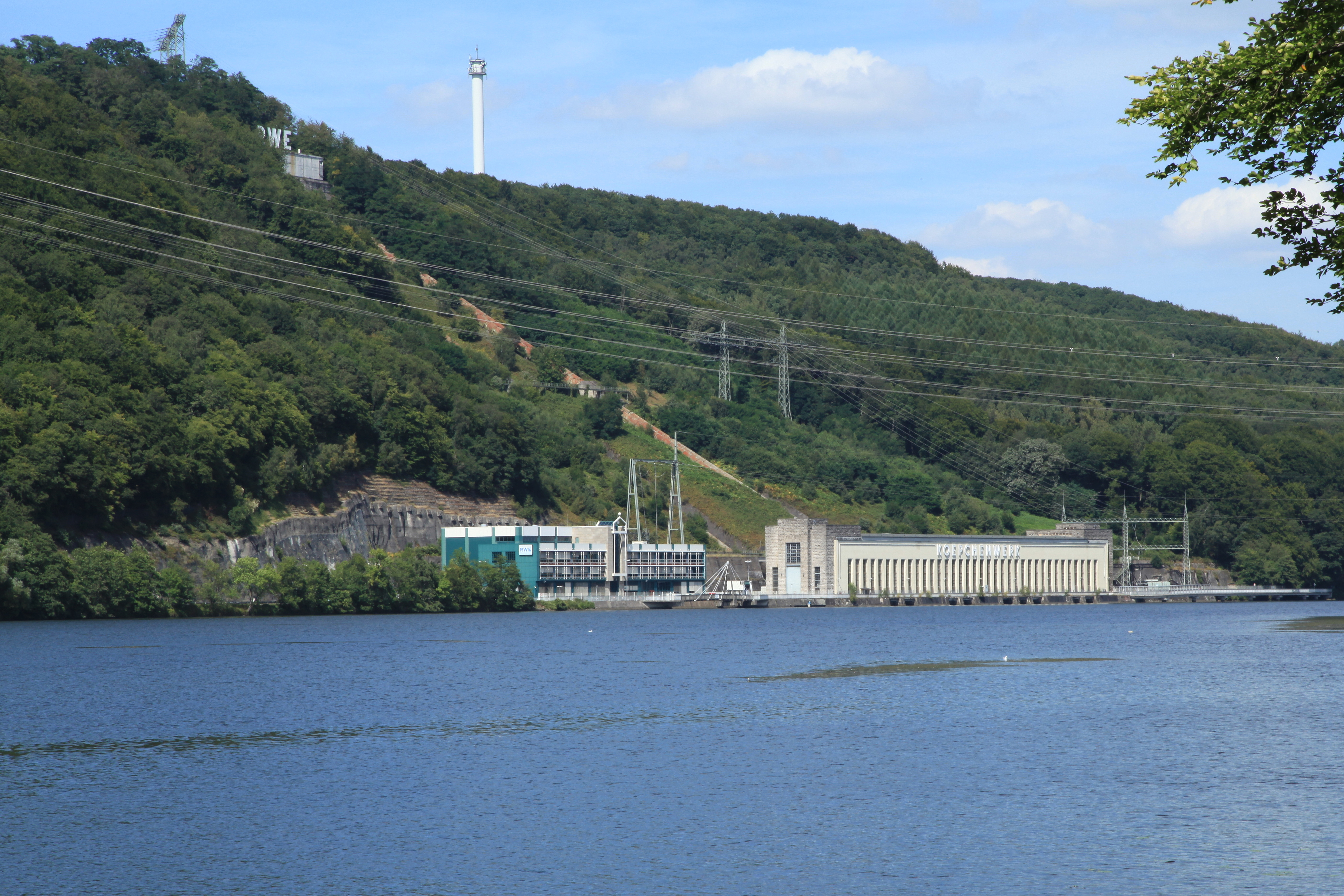 Blick von der Seestraße in Hagen auf das Koepchenwerk in Herdecke